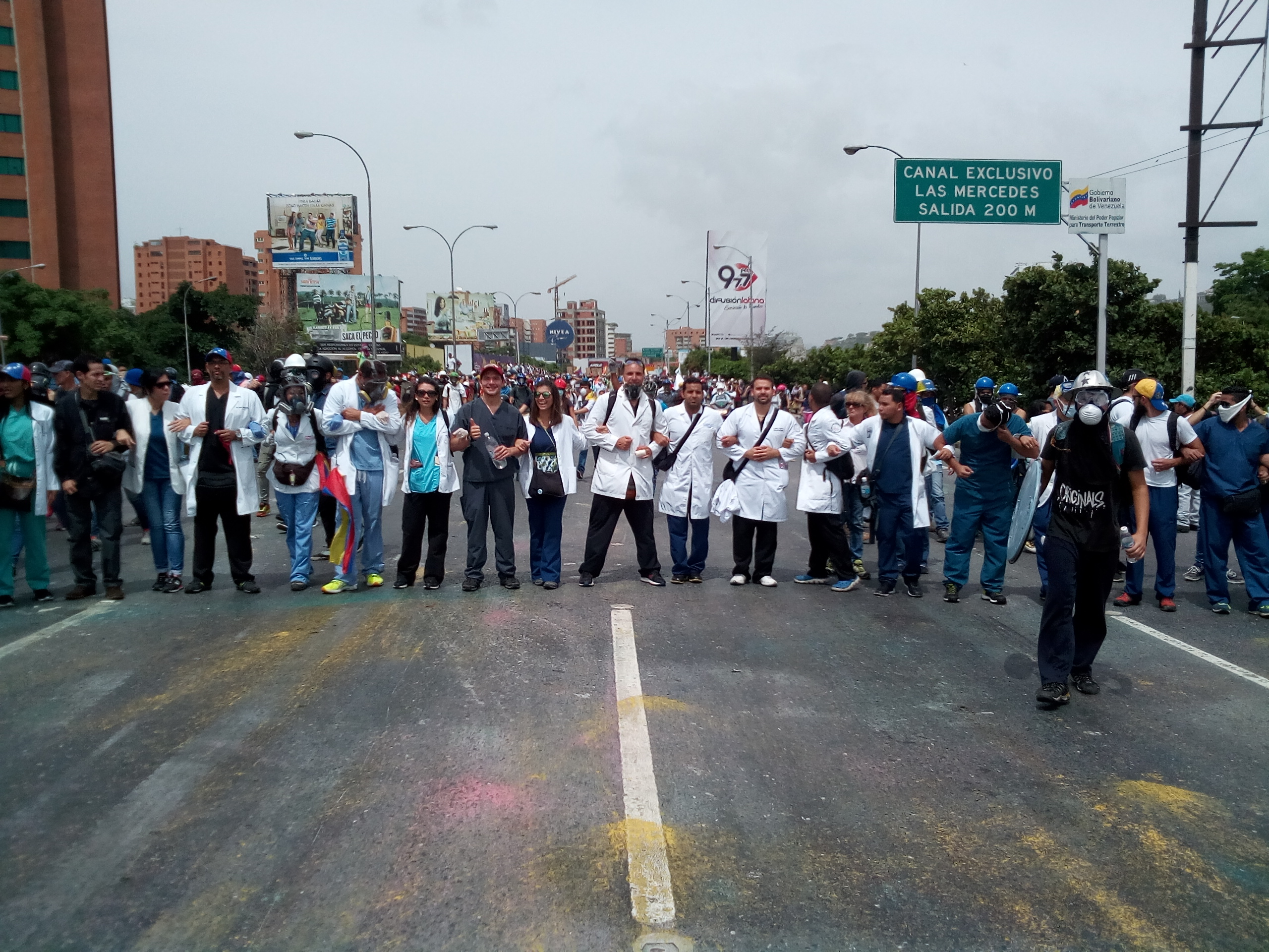 Médicos de brazos cruzados durante la marcha de los médicos el 22 de mayo de 2017 en Caracas, Venezuela.